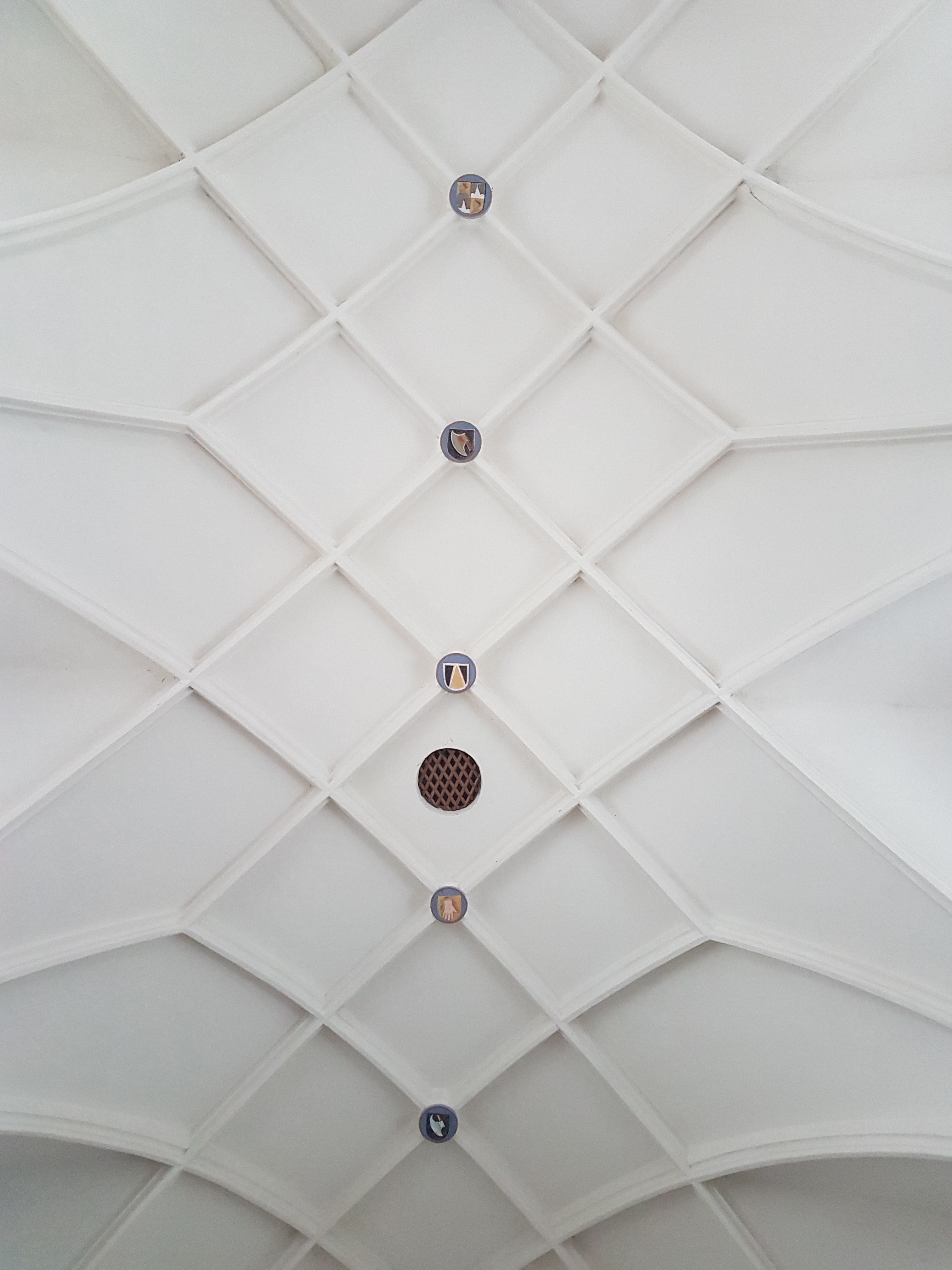 Mühldorf (Petershausen), Wallfahrtskirche St. Ulrich, spätgotisches Netzgewölbe mit bunt bemalte Schlusssteine, diese zeigen unter anderem die Wappen der Herren von Kammer, aus der Familie der Parthenecker, des Freisinger Bischofs Sixtus von Tannberg (1473/74–1495), das Wappen von Wolfgang Freiherr v. Weichs, Pfarrer in Hohenkammer und Domherr zu Freising (1473–1490), sowie die fürstbischöflichen Insignien.